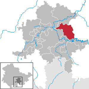 Unterwellenborn in Thuringia - District Saalfeld-Rudolstadt